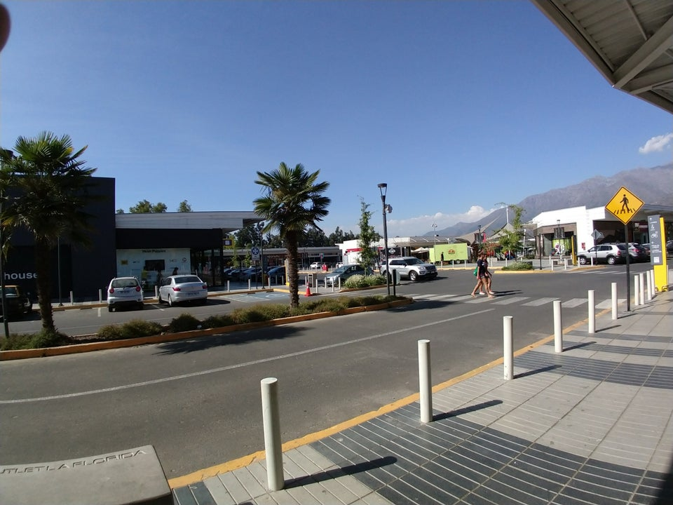 VIVO